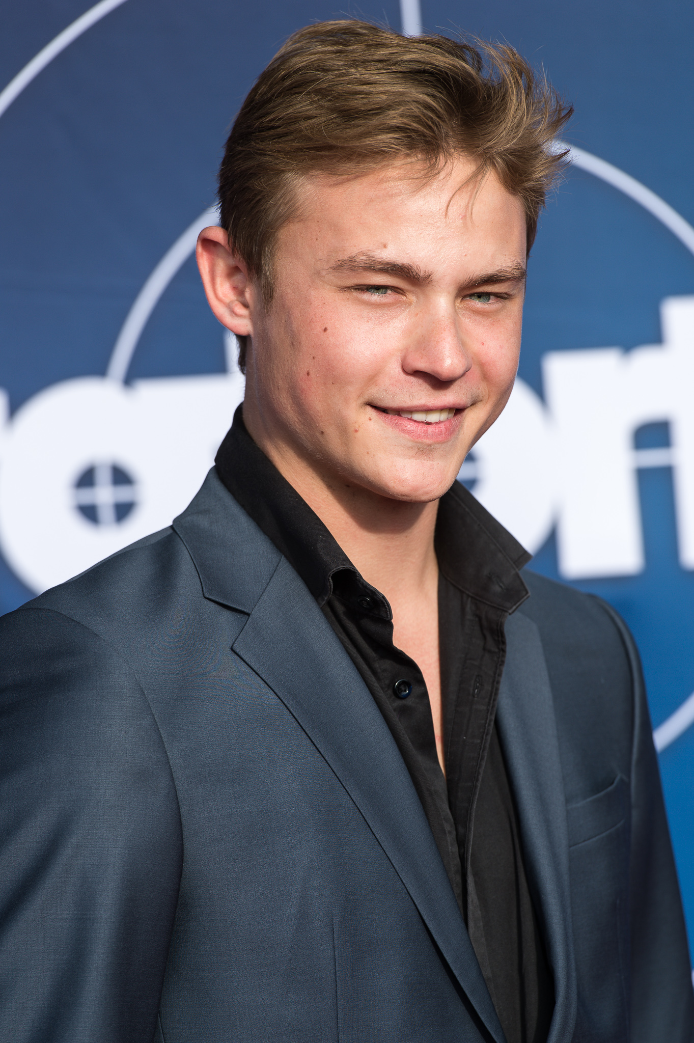 Cinecitta,Dennis Mojen,Der Himmel ist ein Platz auf Erden,Premiere Franken-Tatort,Schauspieler,Tatort